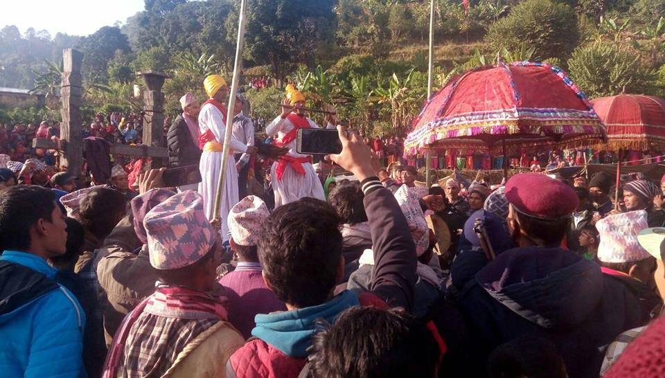 नेपाली: Mohanyal Aladi Doti Nepal